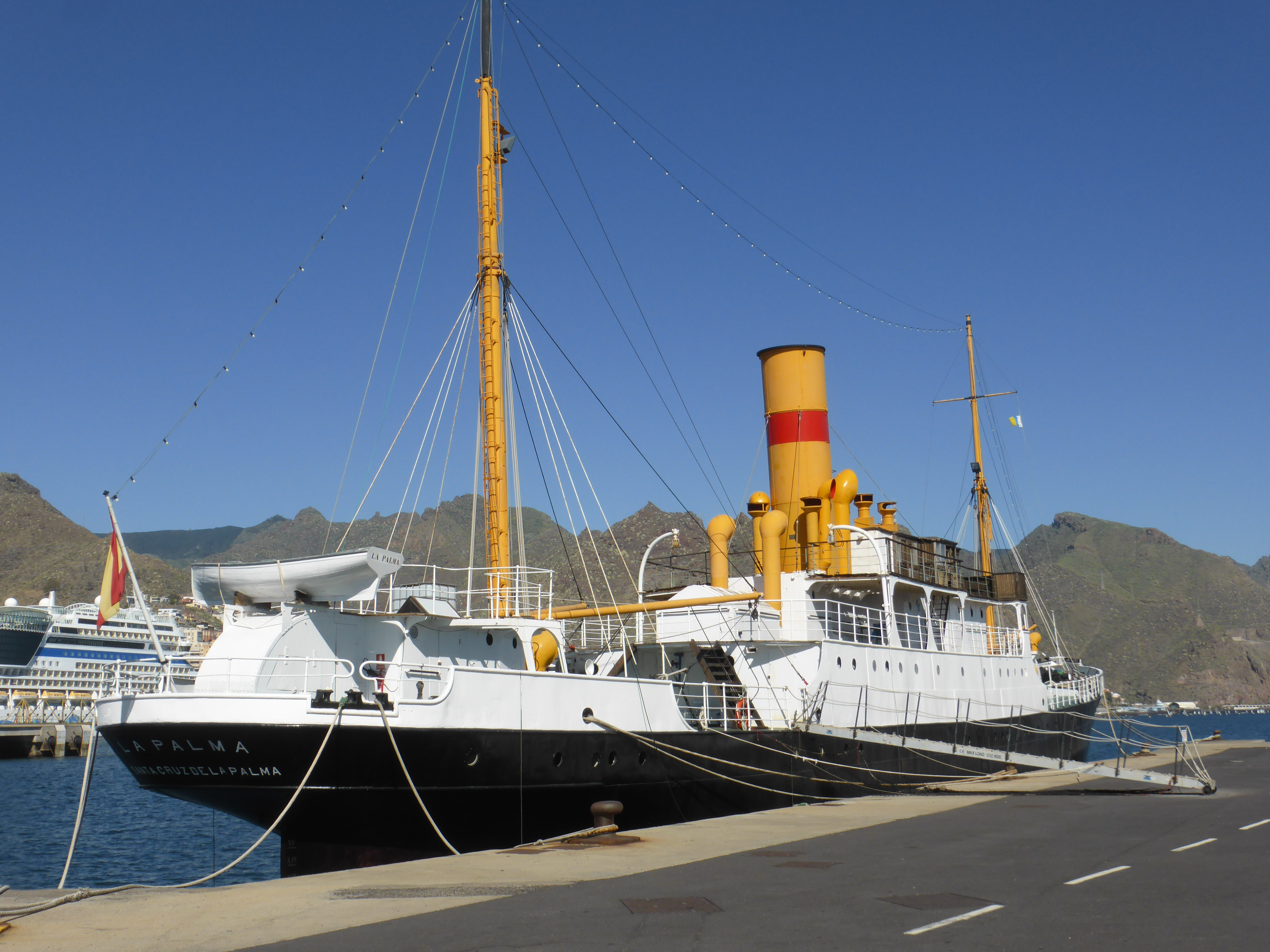 Centenario correíllo "La Palma", construido en el año 1912, para la antigua "Compañía de Vapores Correos Interinsulares Canarios". A partir de 1930 perteneció y recibió los colores de la "Compañía Trasmediterránea". Puerto de matrícula: Santa Cruz de La Palma. Actualmente atracado permanentemente en el puerto de Santa Cruz de Tenerife.